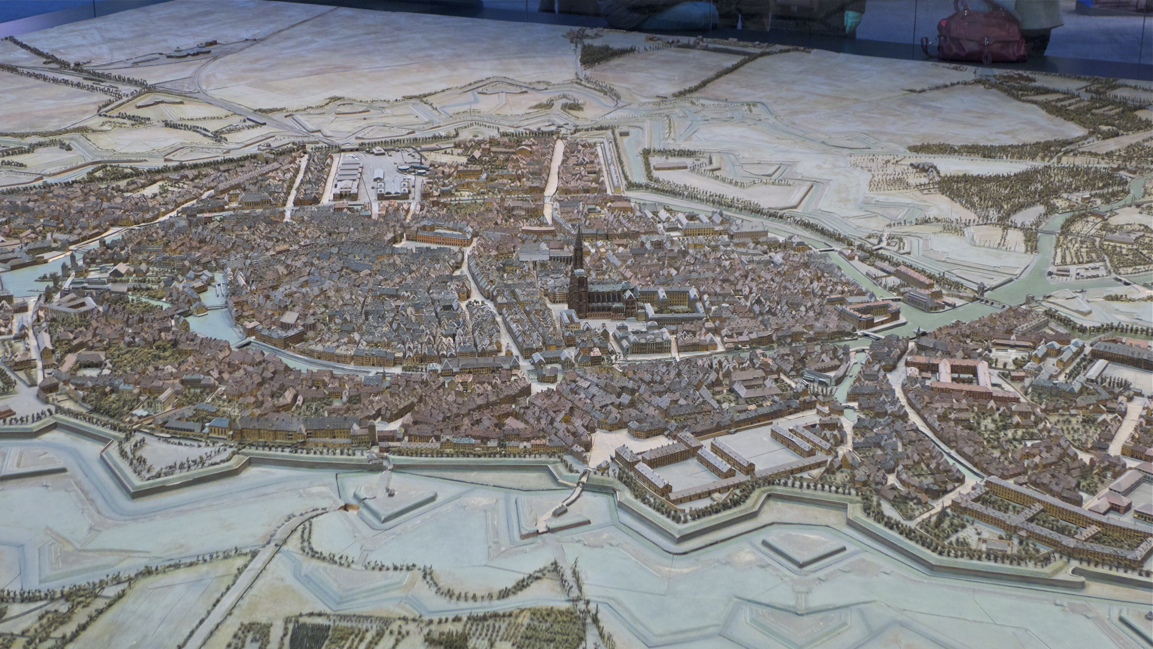 Plan-relief de Strasbourg en 1863. Plan-relief construit de 1830 à 1836 sous la direction de Boitard et actualisé de 1852 à 1863. Échelle 1/600e